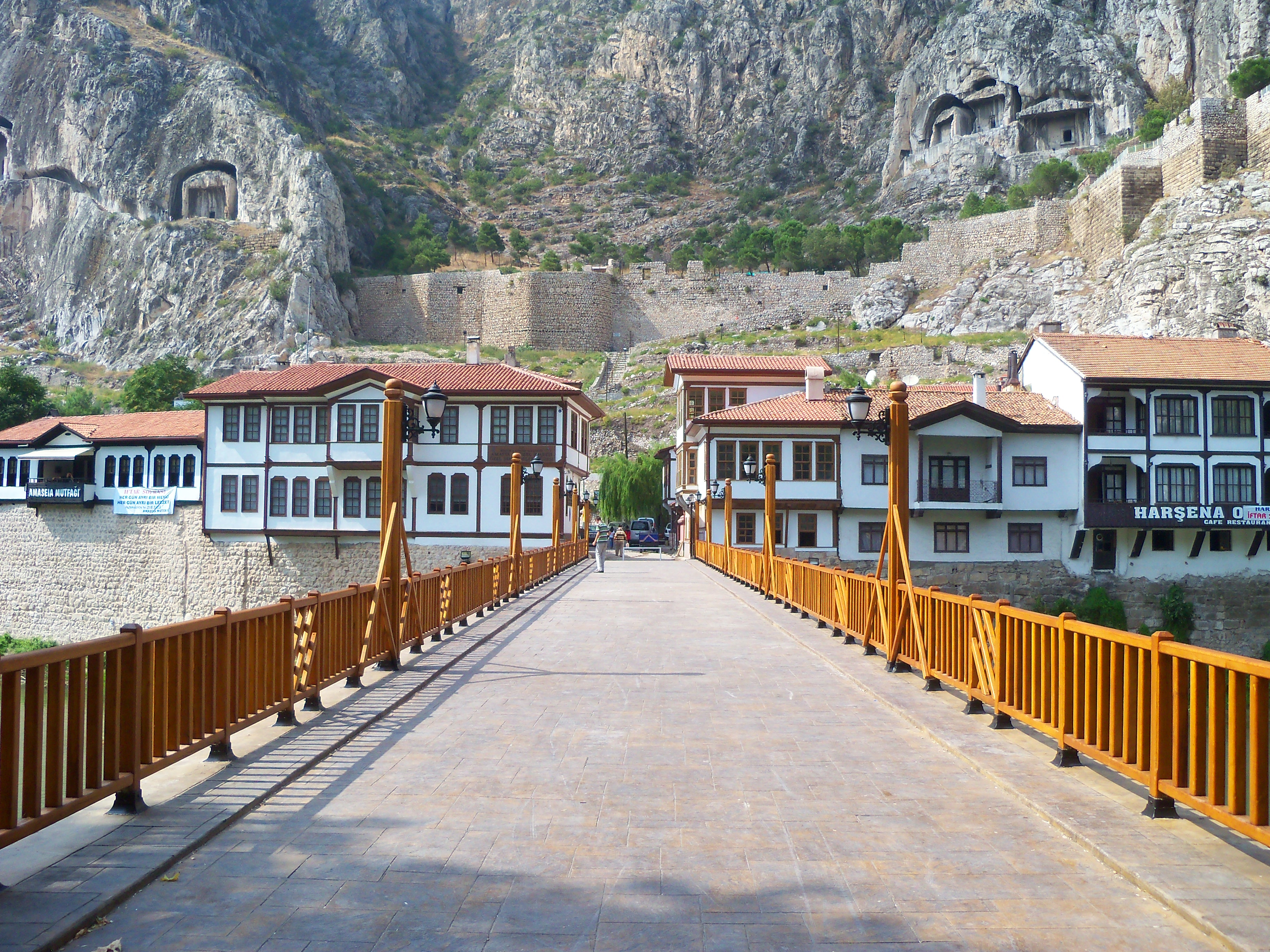 Köprü